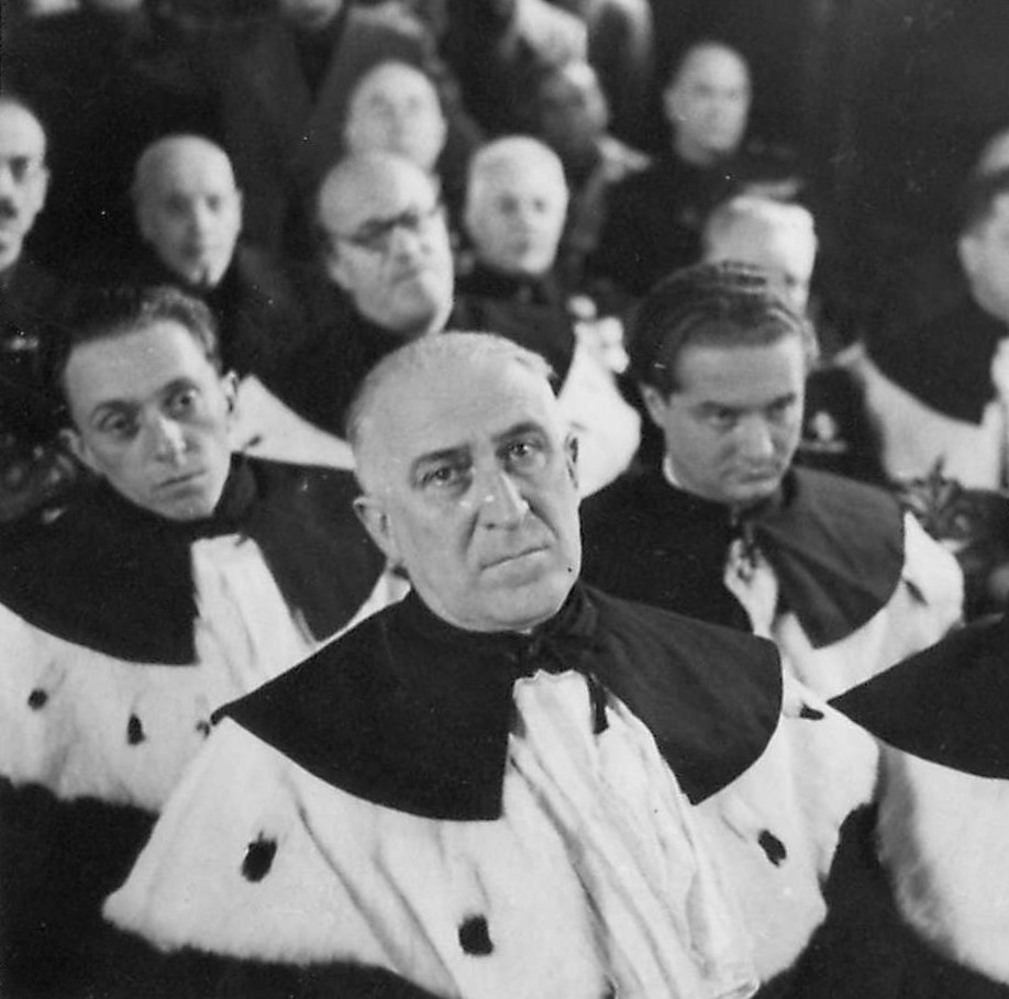 fotografia